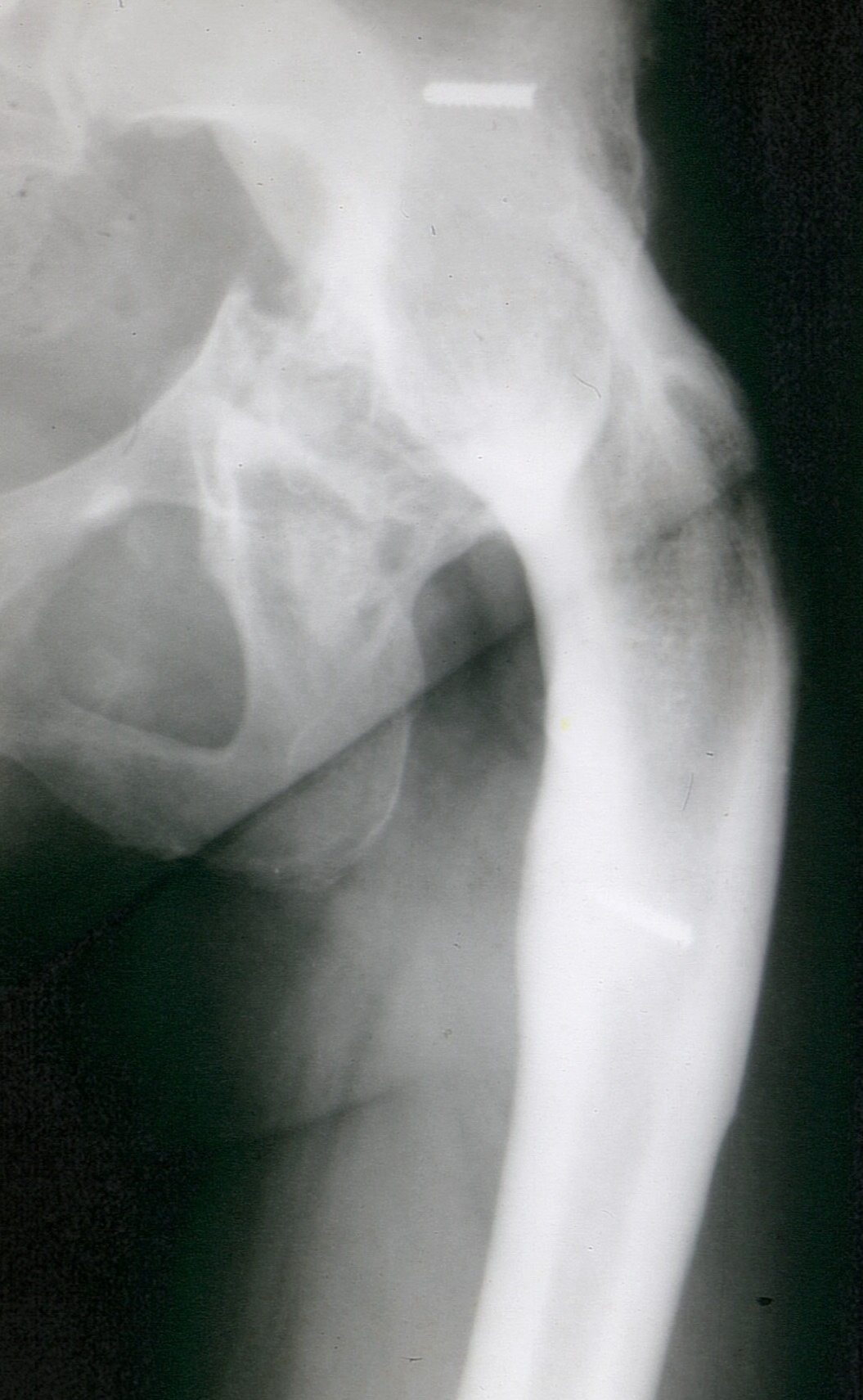 Alte Arthrodese des Hüftgelenks nach Acetabulumfraktur